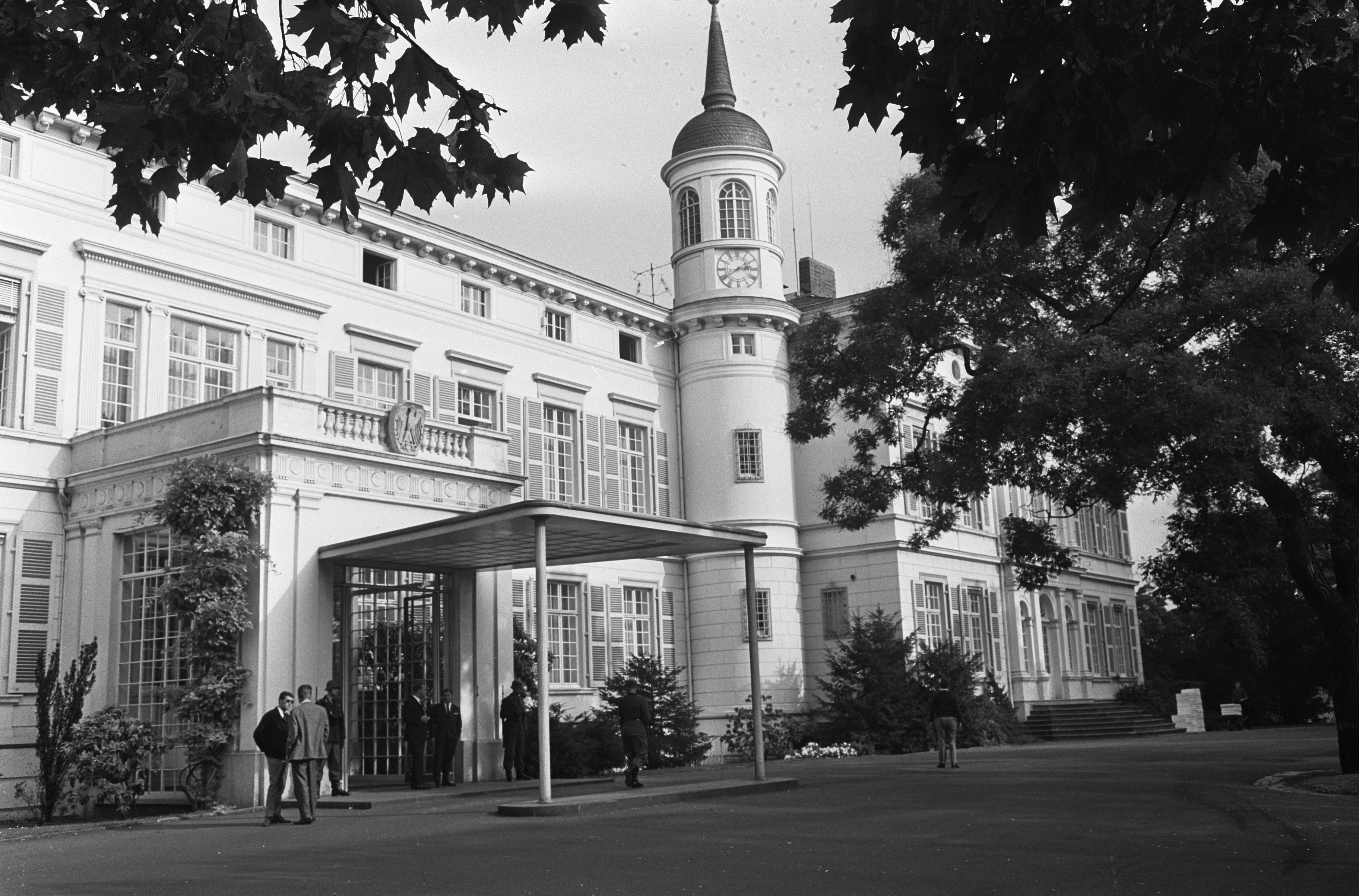 Collectie / Archief : Fotocollectie Anefo Reportage / Serie : [ onbekend ] Beschrijving : Bondskanselarij te Bonn Datum : 4 oktober 1964 Locatie : Bonn Trefwoorden : gebouwen, regeringen Fotograaf : Pot, Harry / Anefo Auteursrechthebbende : Nationaal Archief Materiaalsoort : Negatief (zwart/wit) Nummer archiefinventaris : bekijk toegang 2.24.01.05 Bestanddeelnummer : 916-9691